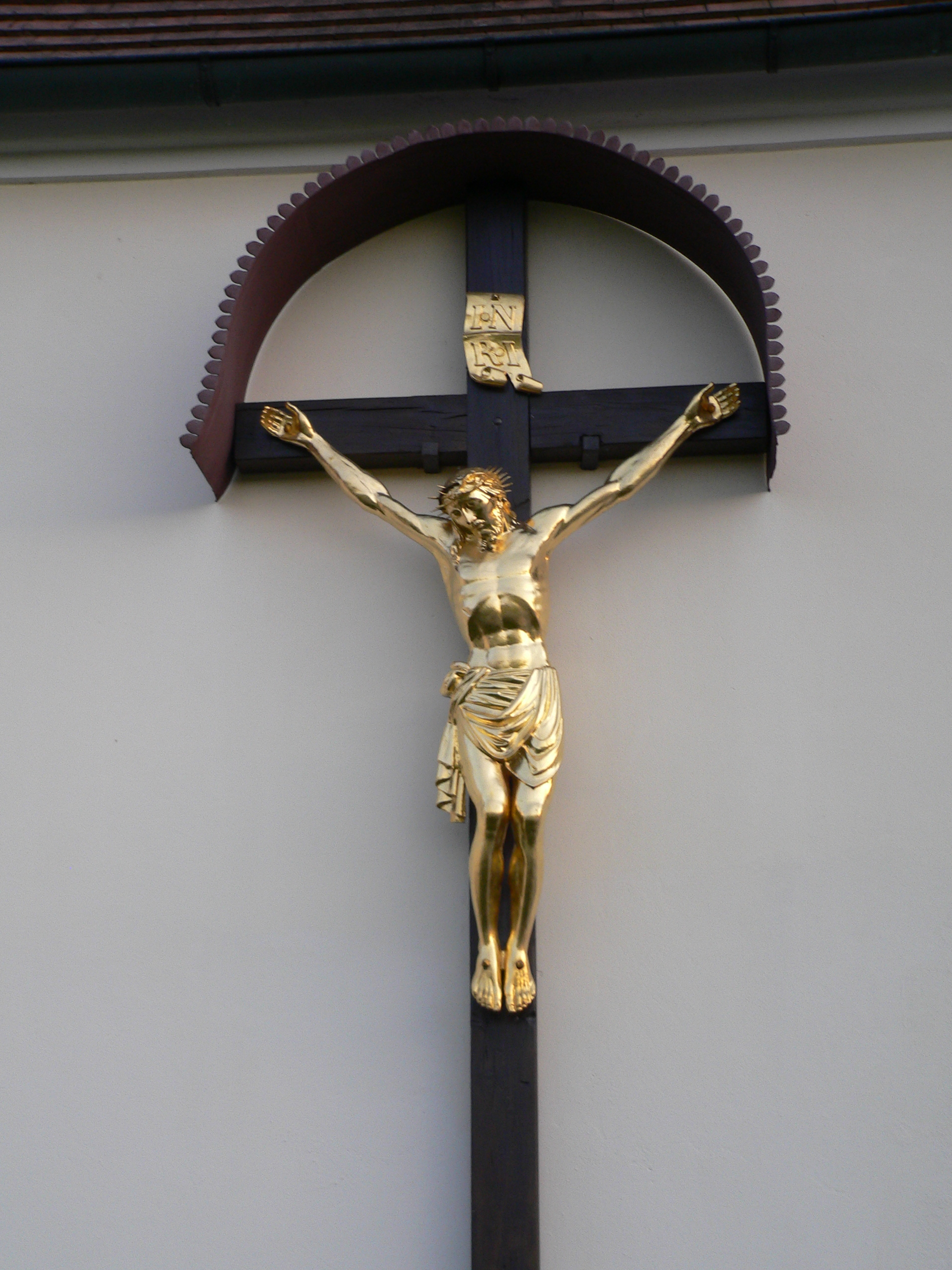 Vergoldetes Kruzifix an der Kirchenwand